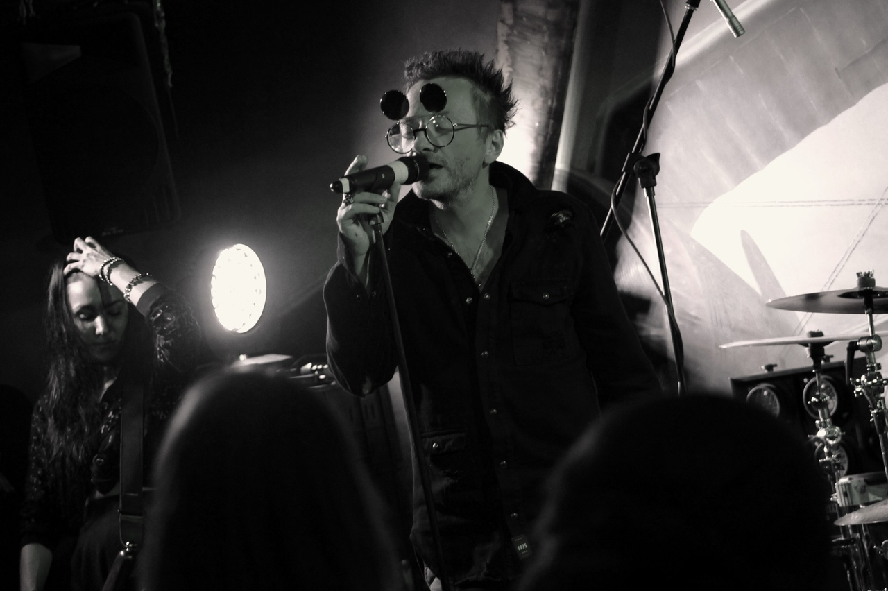 Глеб Самойлов. Калуга, 2016 г